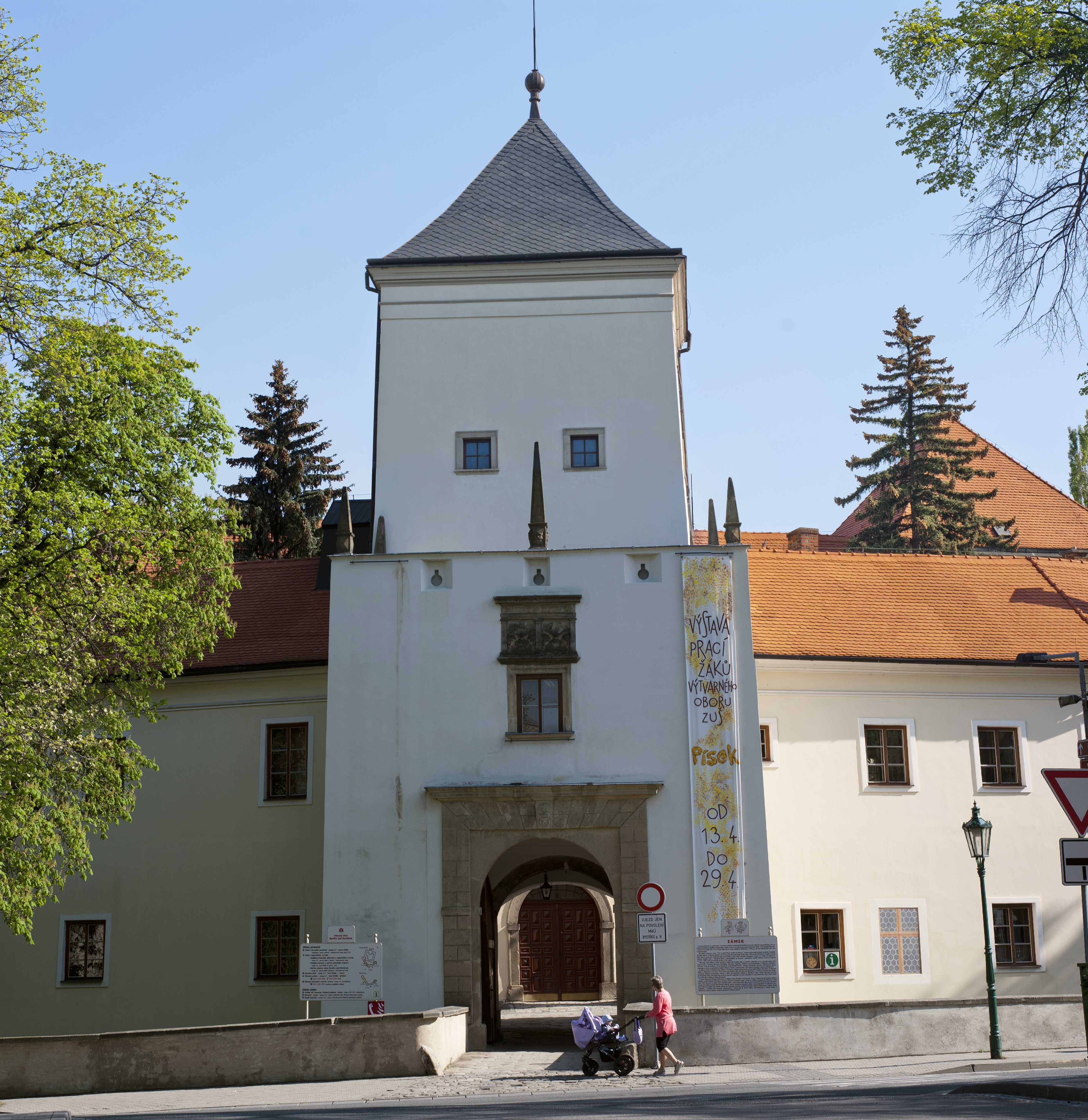 Zámek - pohled na vchod